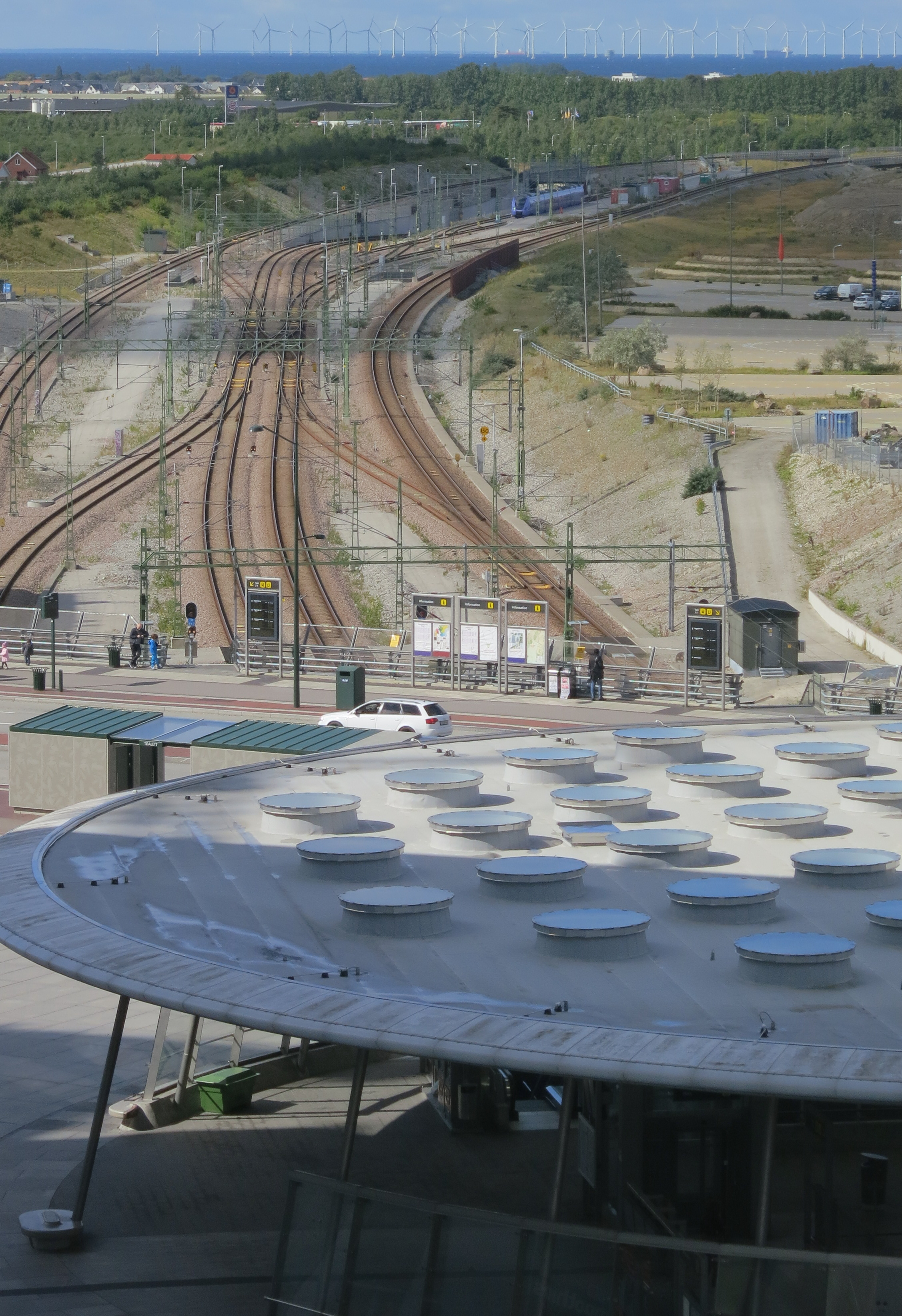 Hyllie station i augusti 2014